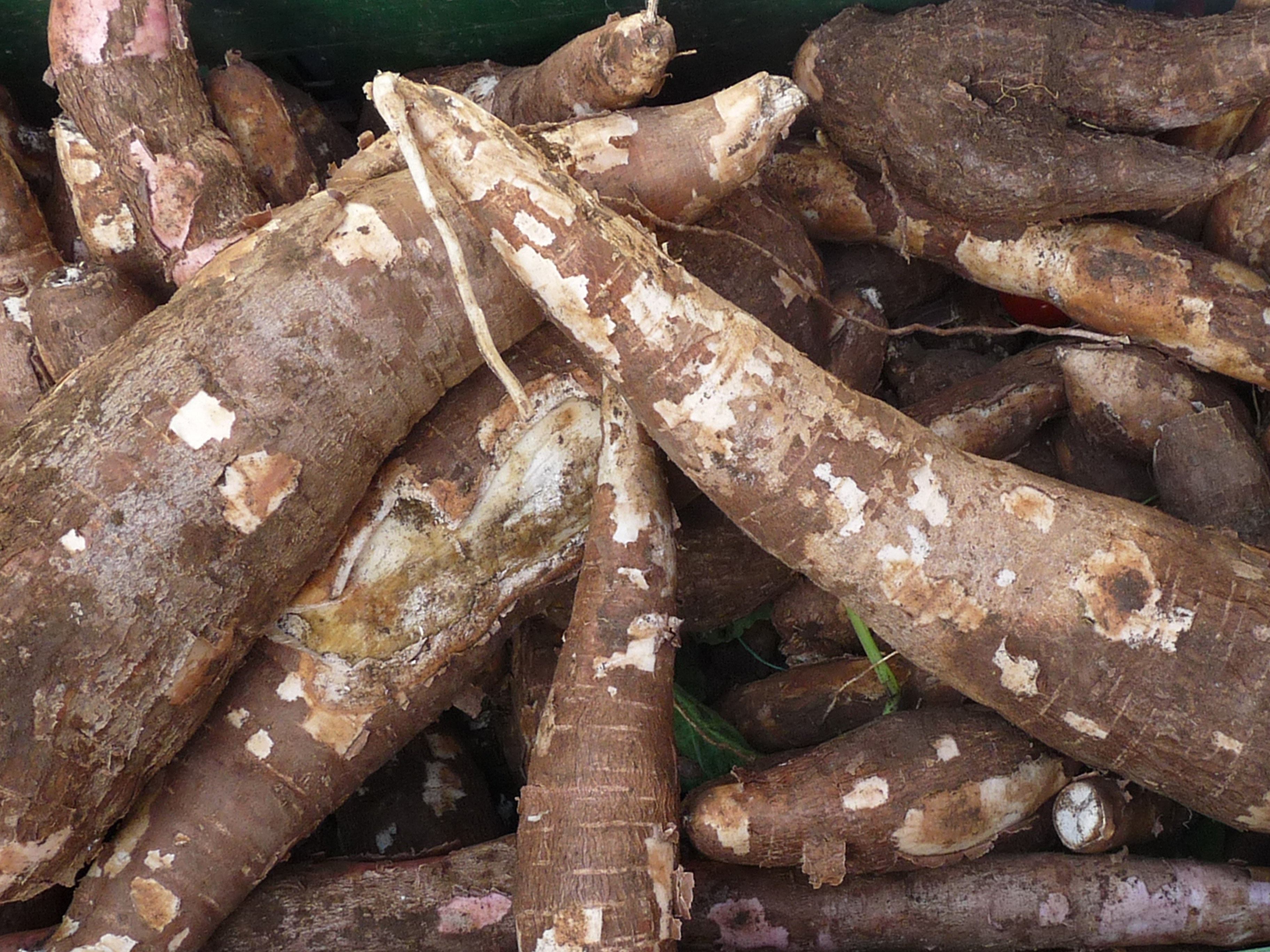 Manioc au marché de Praia (Cap-Vert)